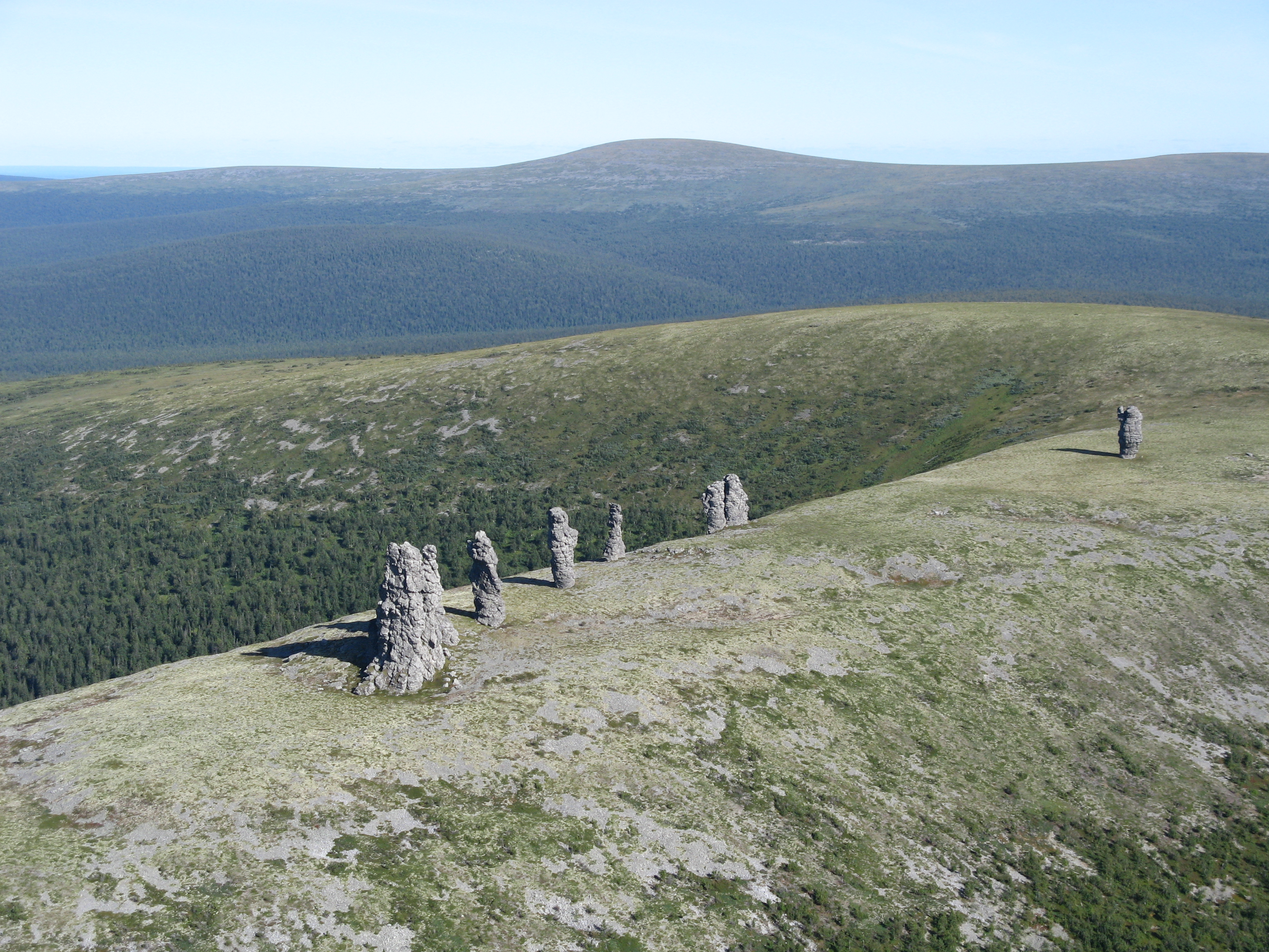 Печоро-Илычский заповедник, Троицко-Печорский район This image is related to the protected area of Russia number 1110342